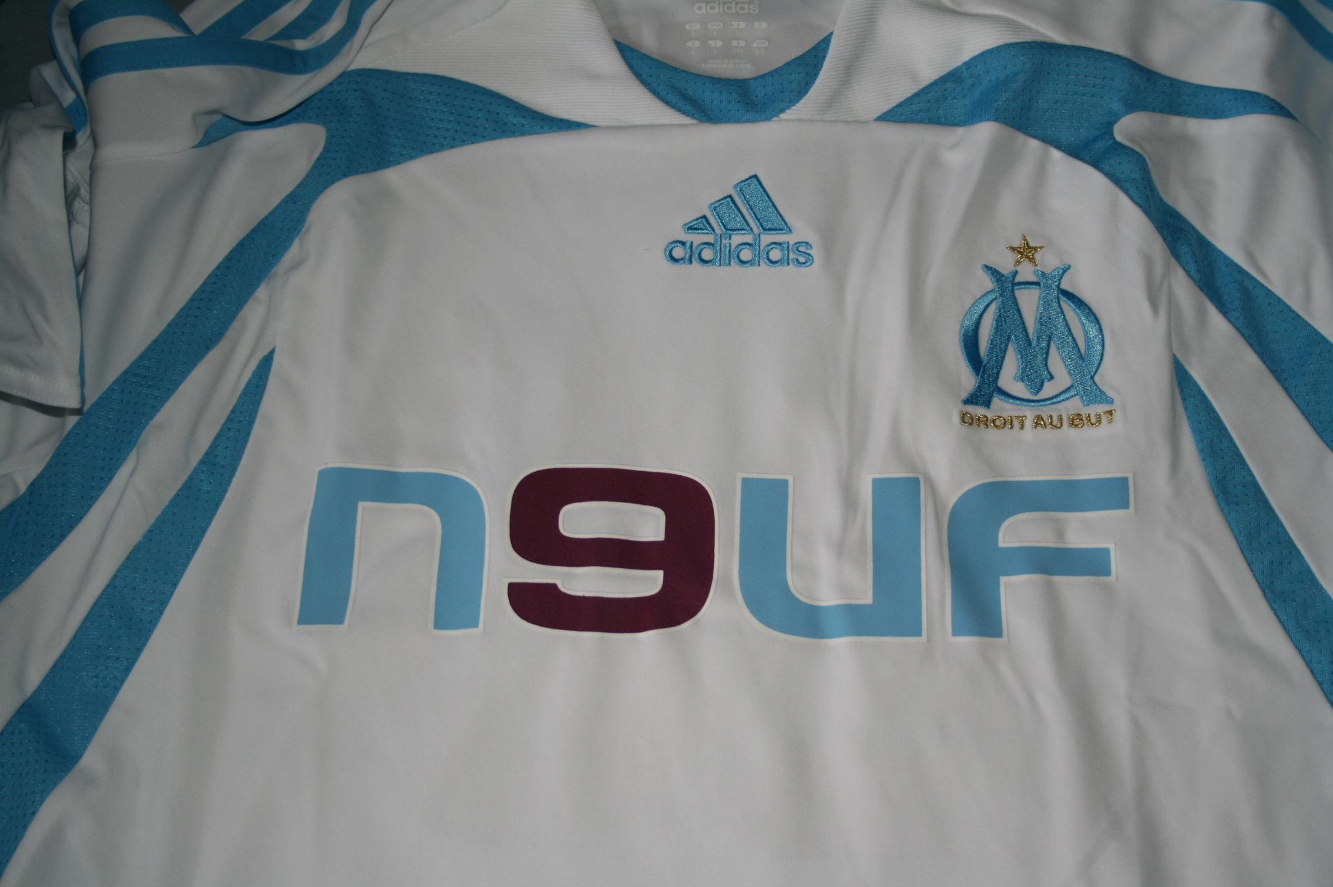 Olympique de Marseille - Footbal Shirt - #28 Mathieu Valbuena 2007-2008